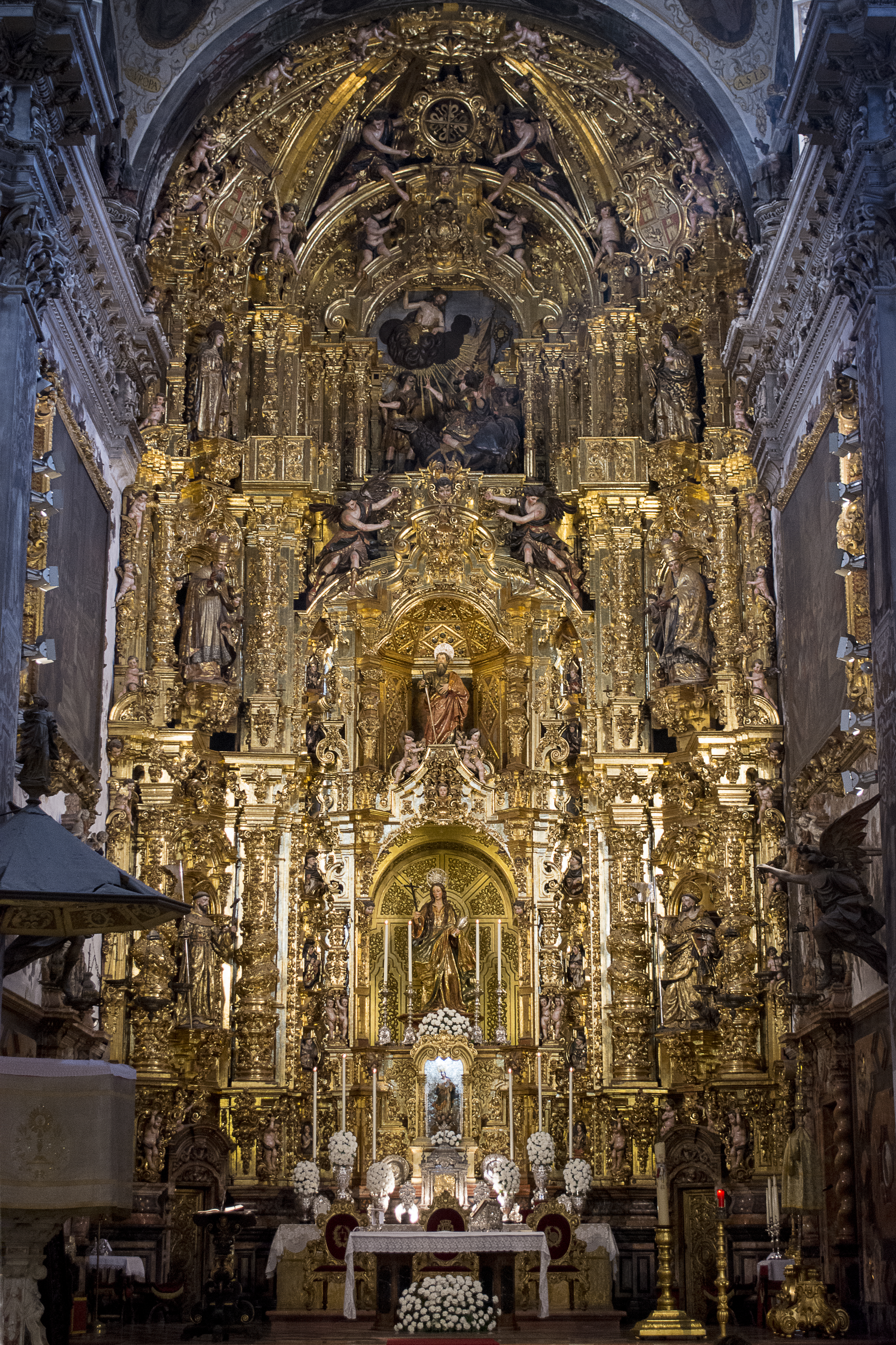 Retablo mayor de la iglesia de la Magdalena de Sevilla. Principios del siglo XVIII